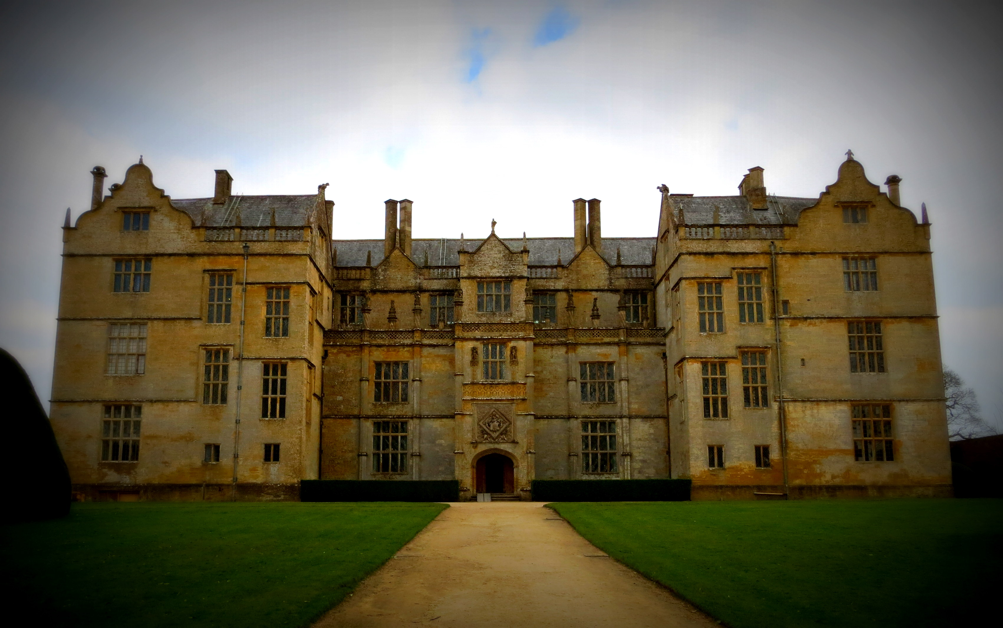 Montacute House